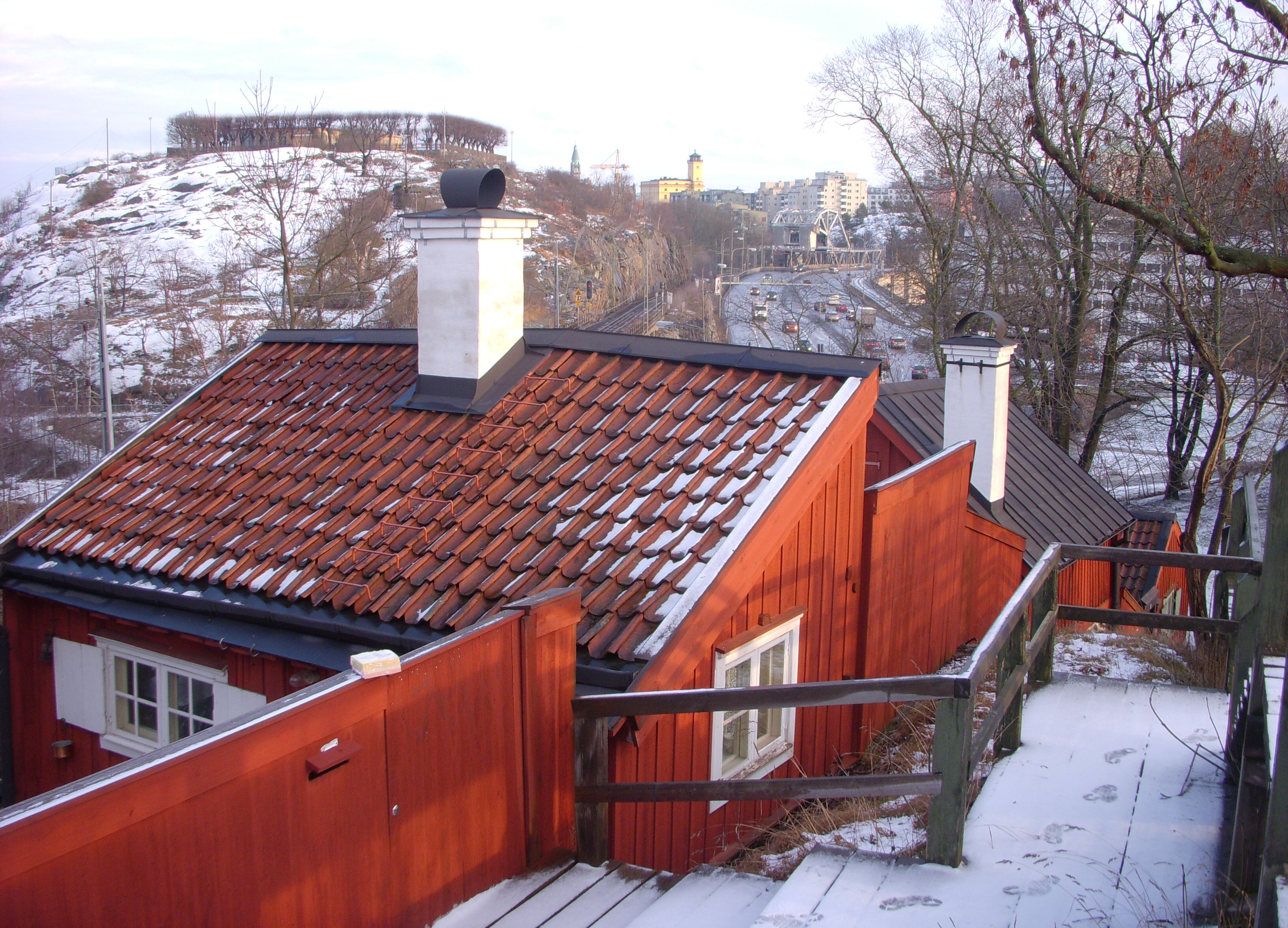 Kvastmakartrappan på Södermalm i Stockholm